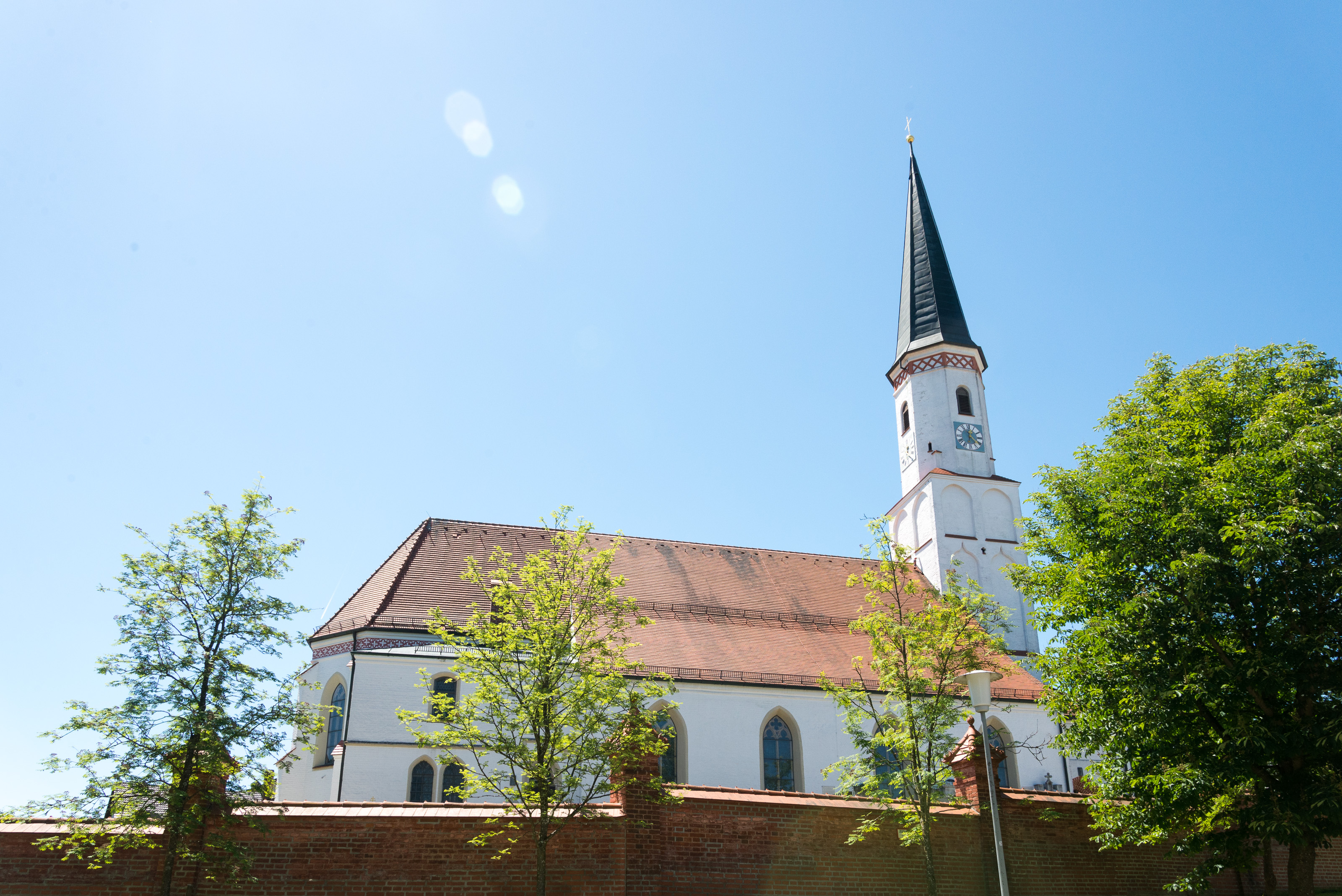 Katholische Pfarrkirche St. Johann Baptist und St. Johann Evangelist, Mauer und Kapelle: Saalkirche mit angebautem Seitenschiff und Westturm, spätgotische Anlage der zweiten Hälfte 15. Jahrhundert, Turmerhöhung und Spitzhelm 1865, Erweiterung des Langhauses 1903-12, Gliederung durch Strebepfeiler und Dachfries am Chor, Westturm mit Geschossgliederung, Blendbögen, Achteckaufsatz und Spitzhelm; mit Ausstattung. Friedhofsmauer, Ziegelstein, weitgehend 19. Jahrhundert mit älteren Fragmenten. This is a photograph of an architectural monument.